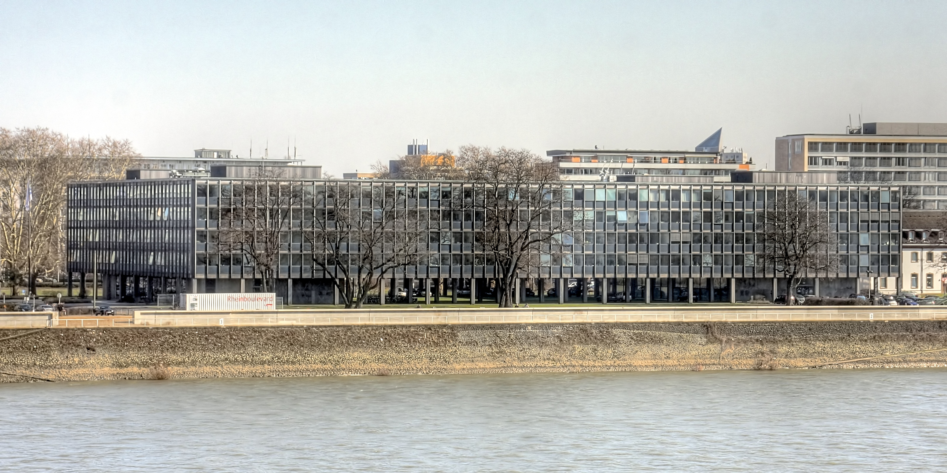 Landeshaus, Zentralverwaltung des Landschaftsverbandes Rheinland (LVR), Köln. Architekten: Eckhard Schulze-Fielitz, Ernst von Rudloff, Baujahr: 1959